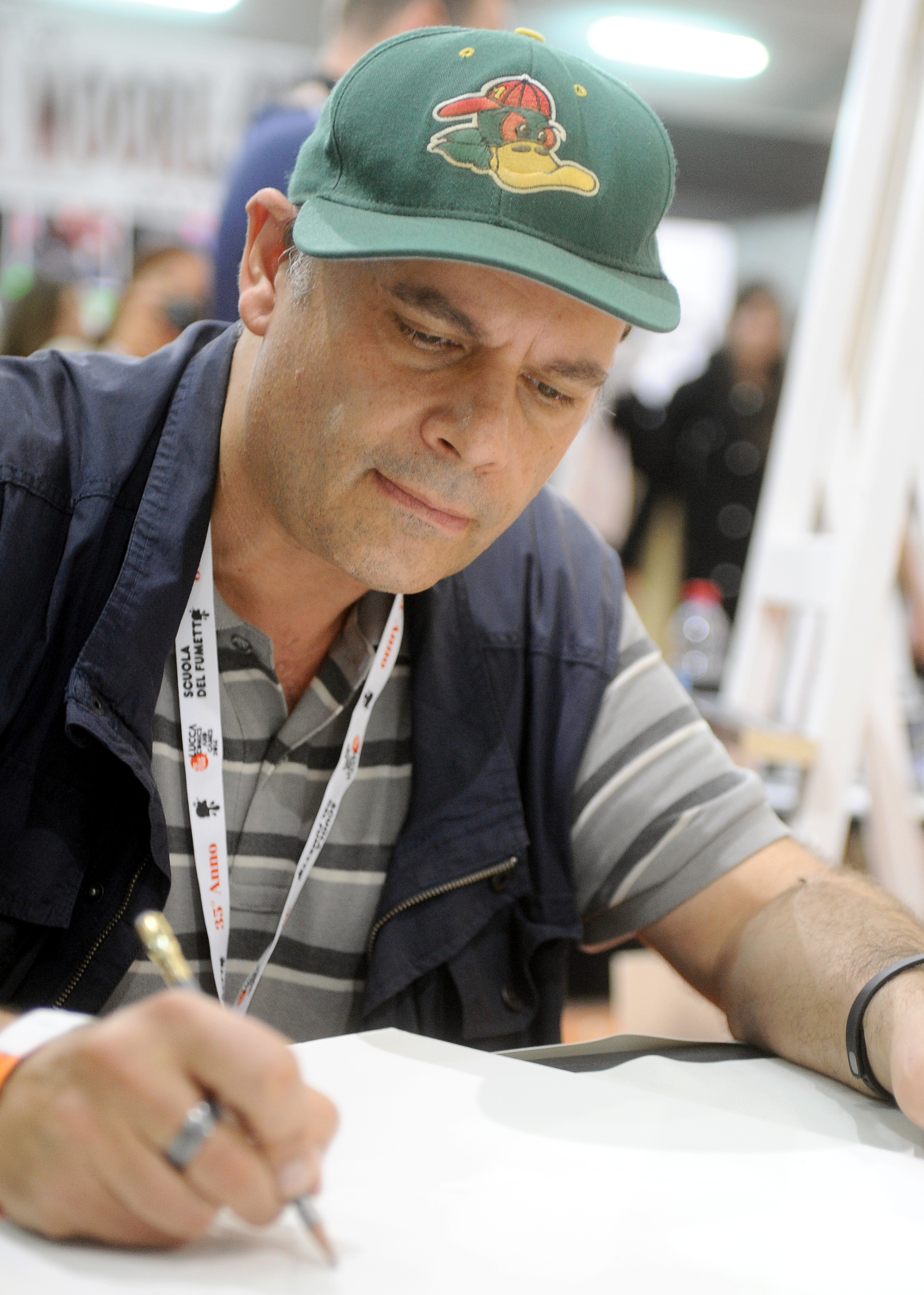 John Kovalic a Lucca Comics & Games 2014.